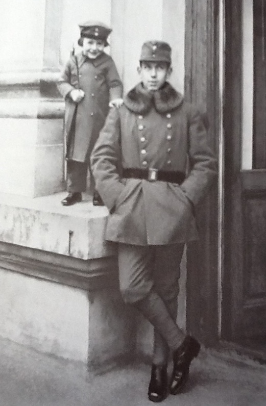 Template:Erzherzog Albrecht II. von Österreich-Teschen